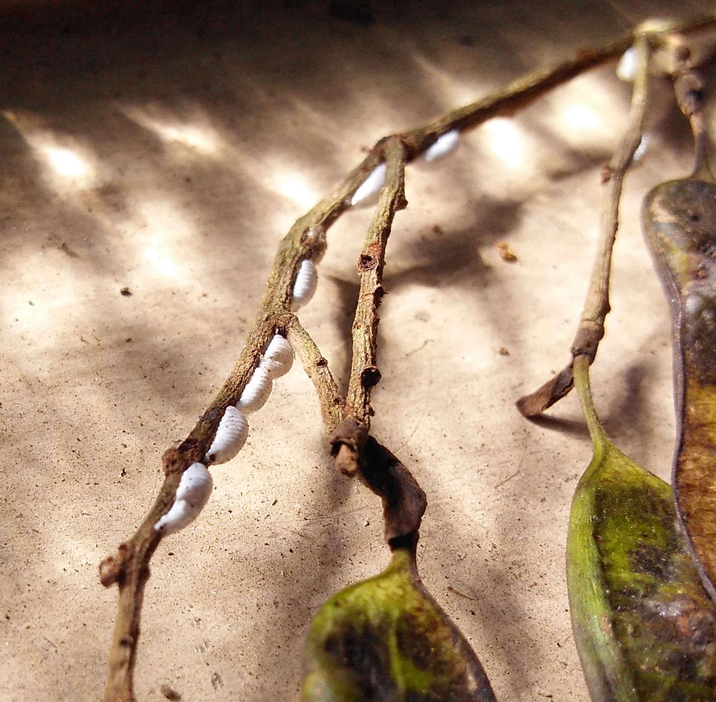 Cochonilha em galho de Jacarandá da Bahia (Parque CEMUCAM - Cotia-SP)